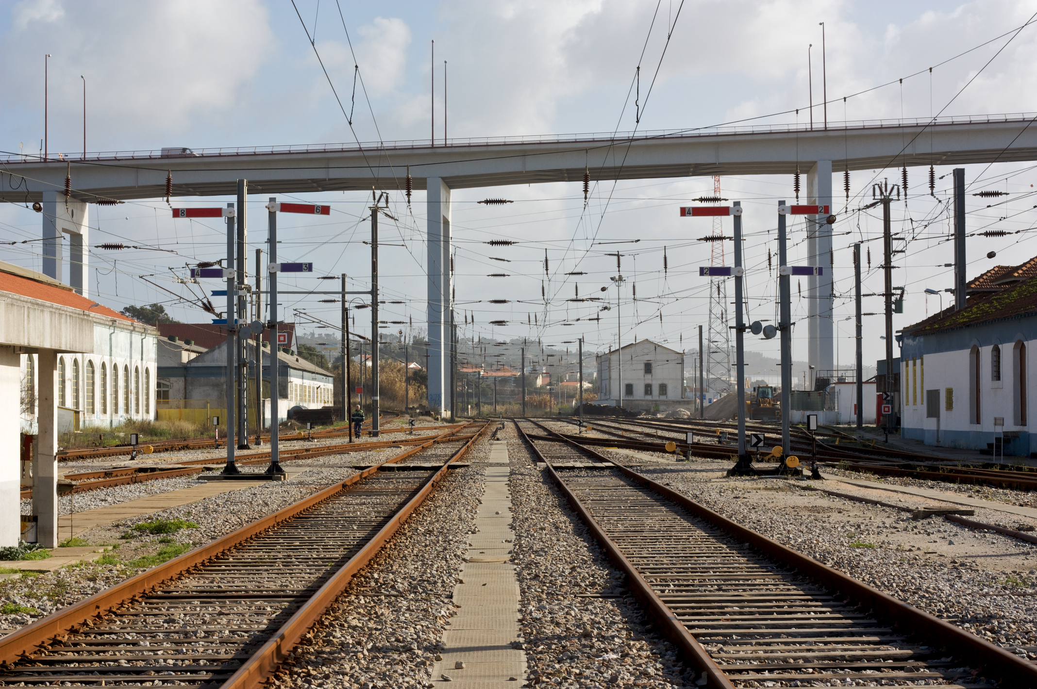 Via férrea: Linha do Oeste [PK 215] Local: Estação da Figueira da Foz Data e hora: 24 de Janeiro de 2009 [11h10] Sentido: Cacém